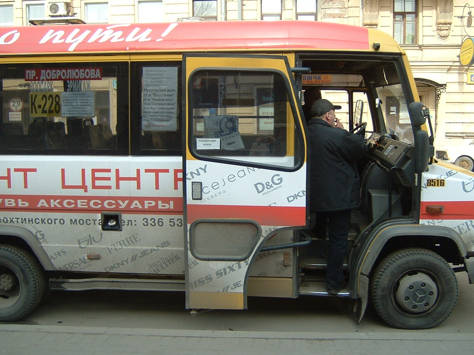 Marshrutka in Saint-Petersburg